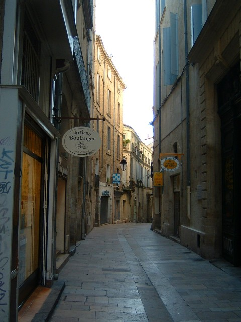 Montpellier : Rue des Trésoriers de la bourse, Montpellier. Photo personnelle .